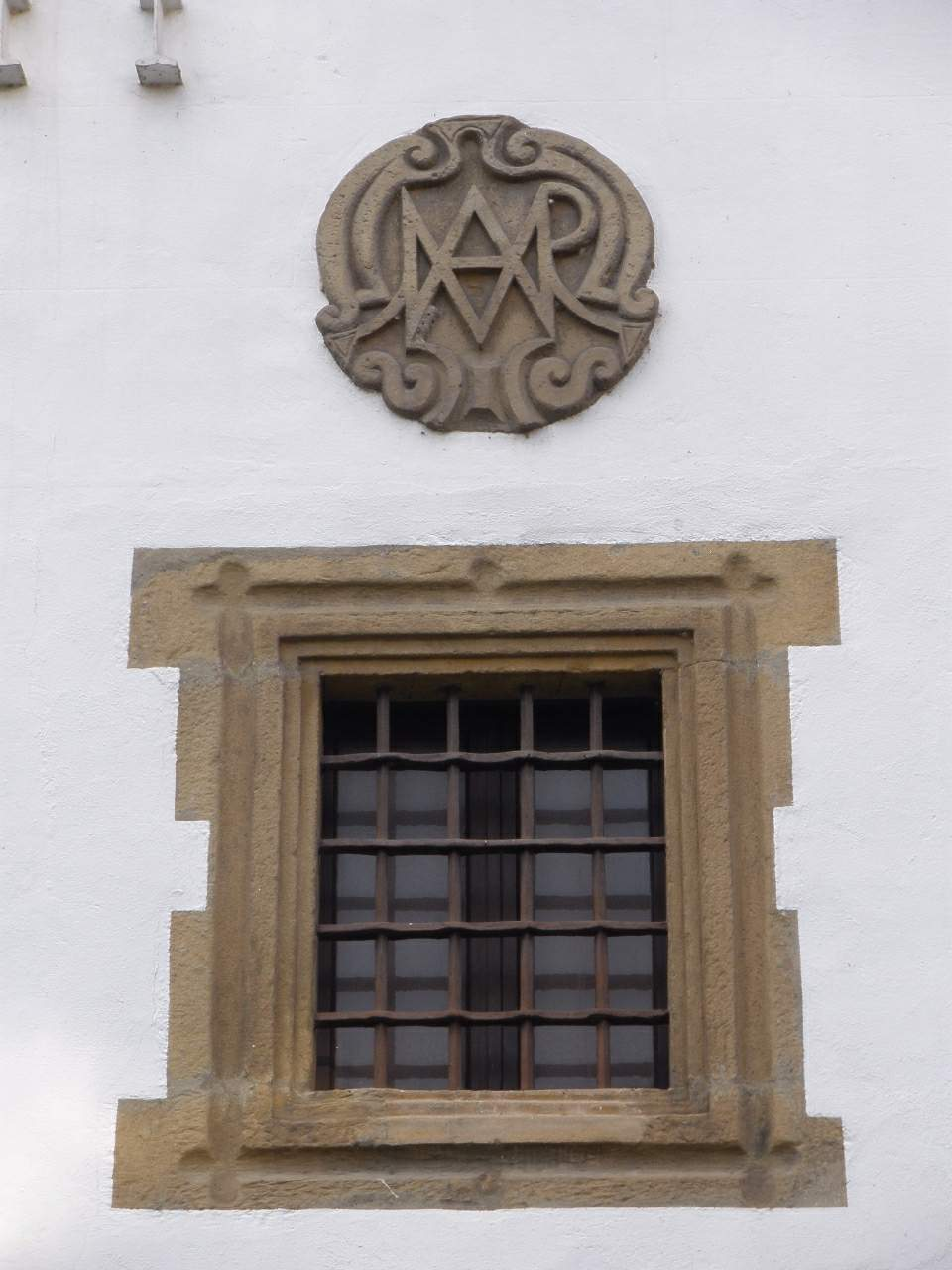 Convento de las Brígidas (Lasarte-Oria, Gipúzkoa)